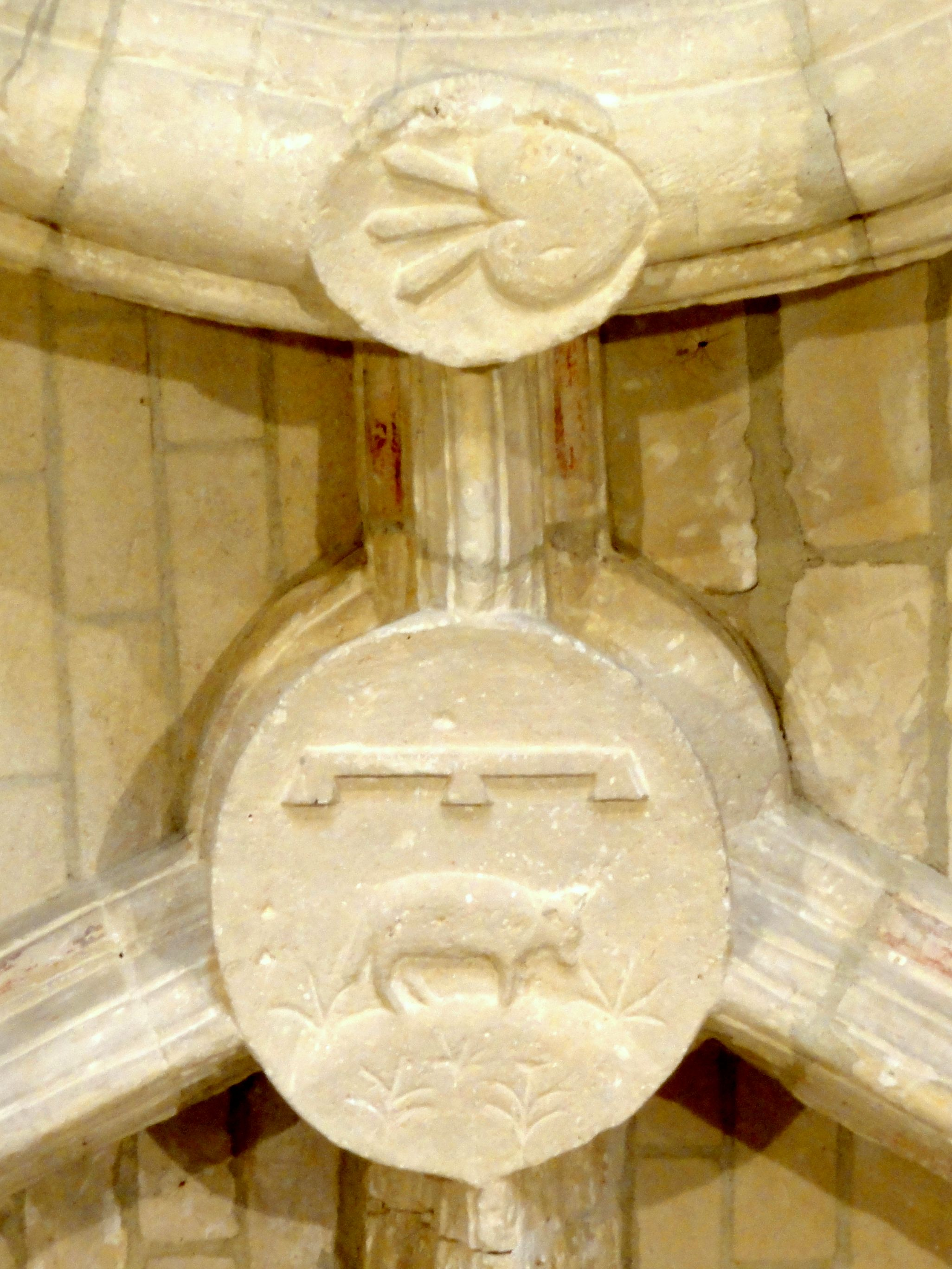 Détail de la voûte de la base du clocher.